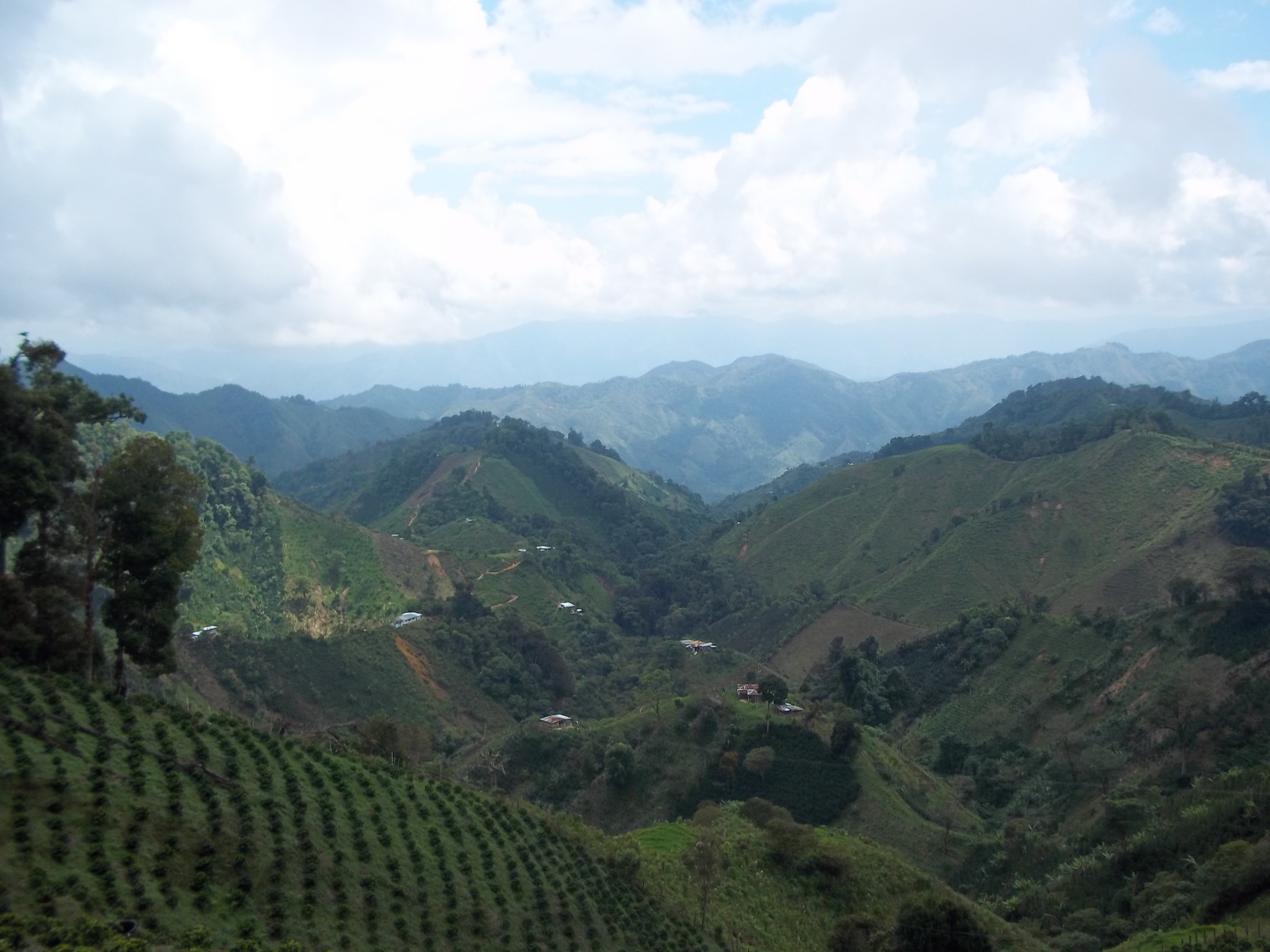 Vista Vereda San Miguel Fotografía: Luis Adalberto García